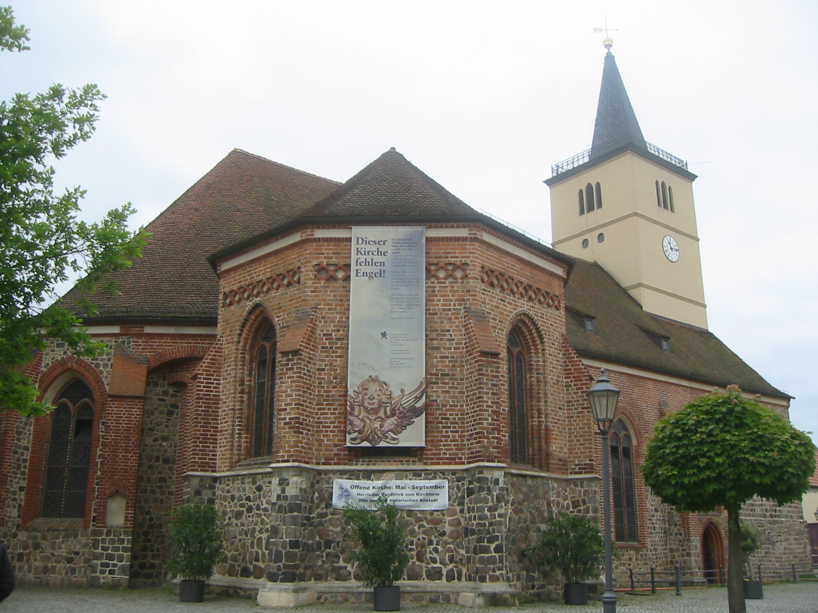 Stadtpfarrkirche St. Marien und St. Nikolai in Beelitz mit Wunderblutkapelle